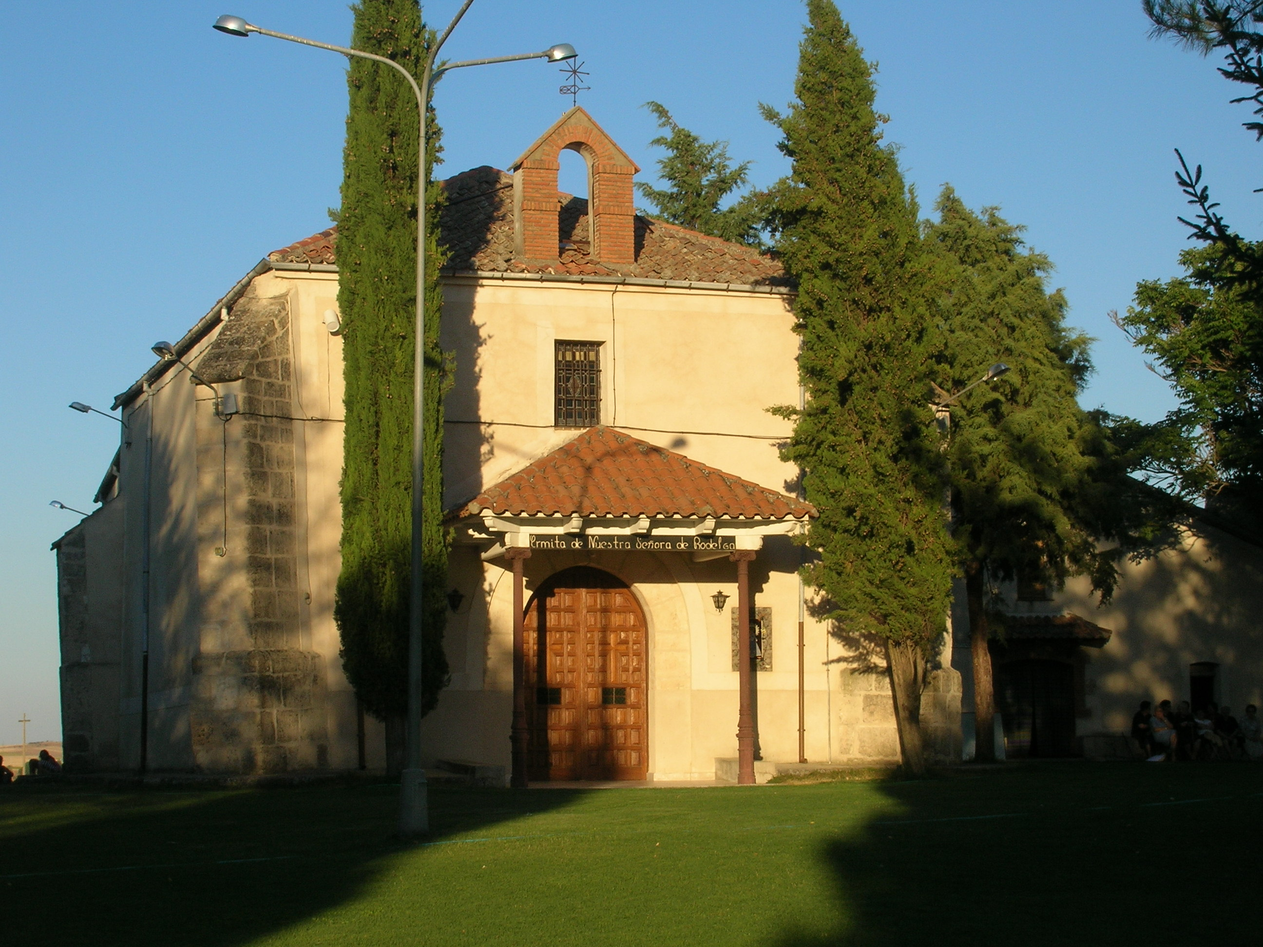 ERMITA DE NUESTRA SEÑORA DE RODELGA